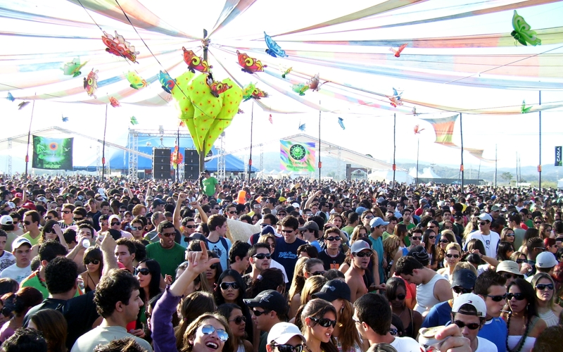 Rave "Xxxperience", em Santa Luzia, região metropolitana de Belo Horizonte. Autor: Cid Costa Neto. Data: 26/Ago/2006.